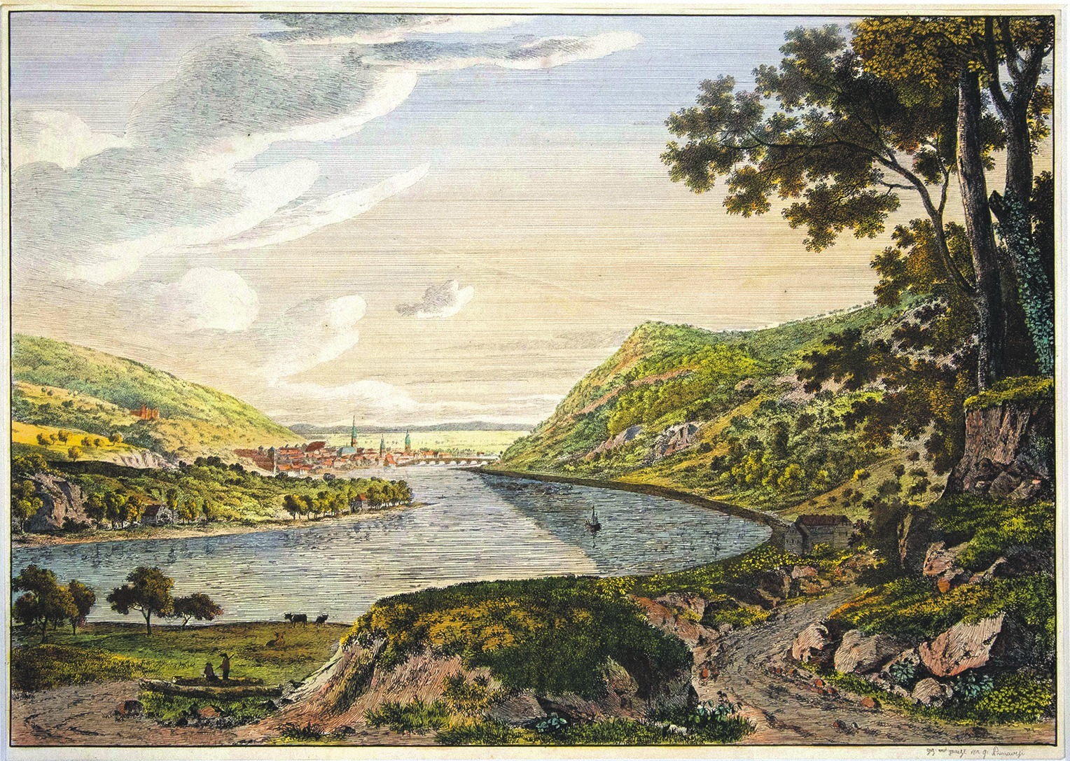 Johann Georg Primavesi, Ansicht der Stadt Heidelberg von Osten, Radierung (entstanden 1803 [Heiko Fischer: Katalogeintrag, in: Ulrike Pecht (Red.): Heidelberg im Portrait. Heidelberg 2018, S. 46-49]), nachträglich koloriert